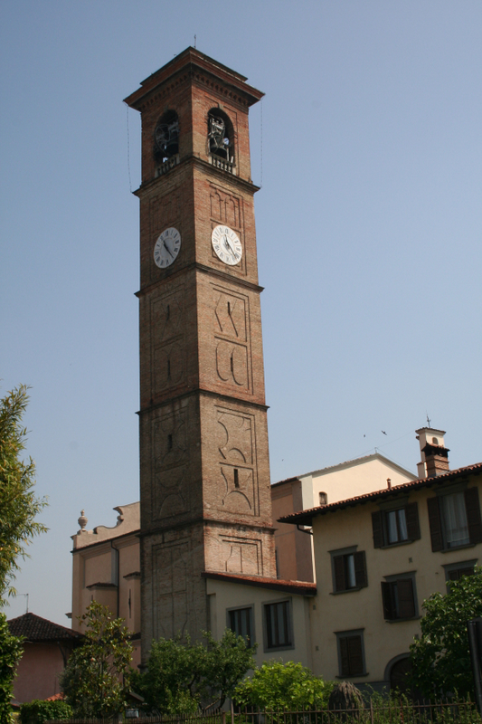 Spirano, torre campanaria.